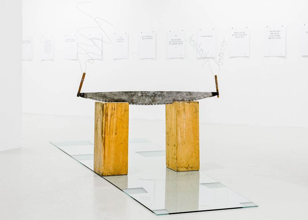 Heinz Baumueller: Singende Saege, 1985-2007 Glasgrundriss / glass plate 400 x 145 x 1 cm, Glas, Holz, Saege, Draht / glass, wood, saw, wire